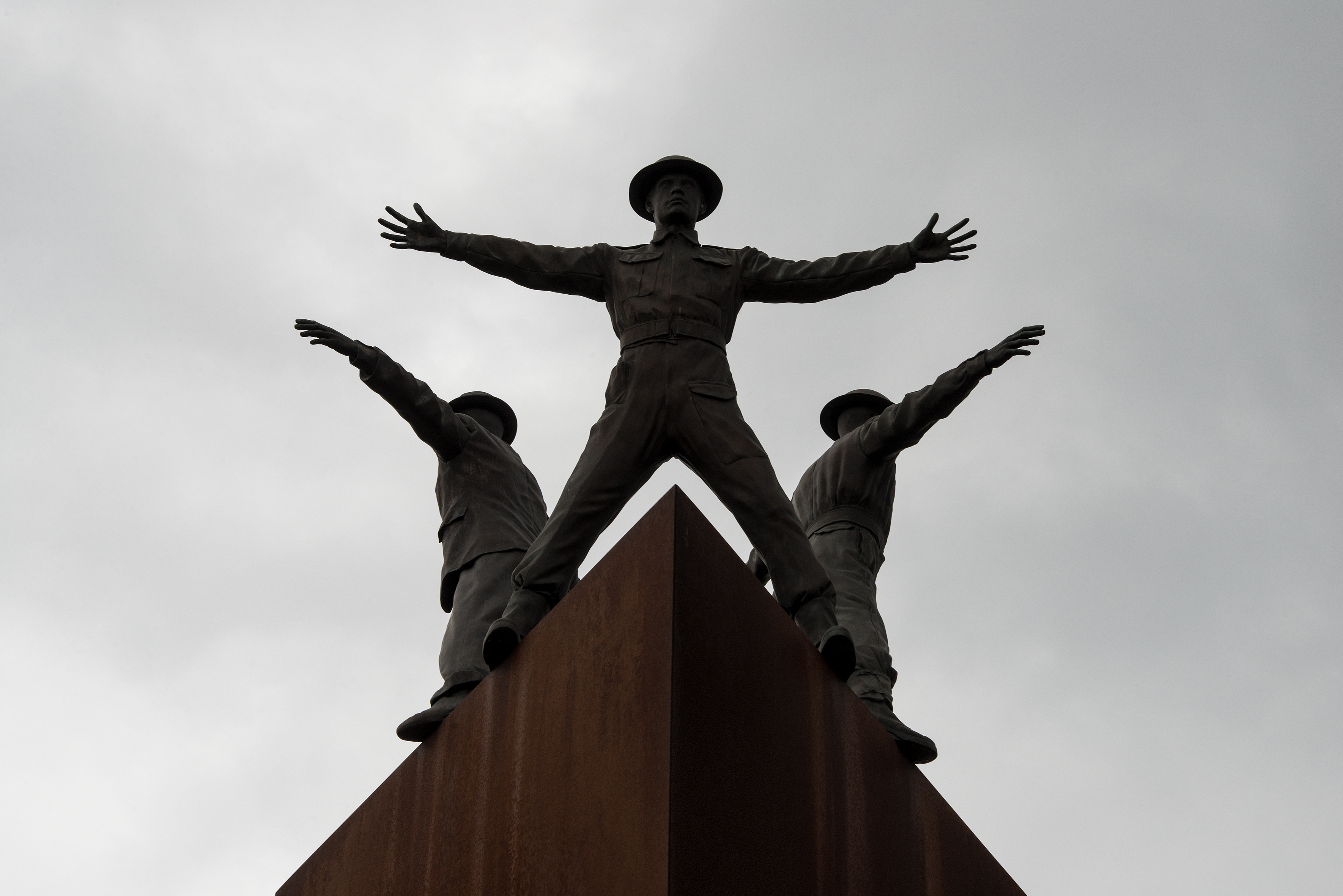 Denkmal der Operation Anthropoid Památník Operaci Anthropoid